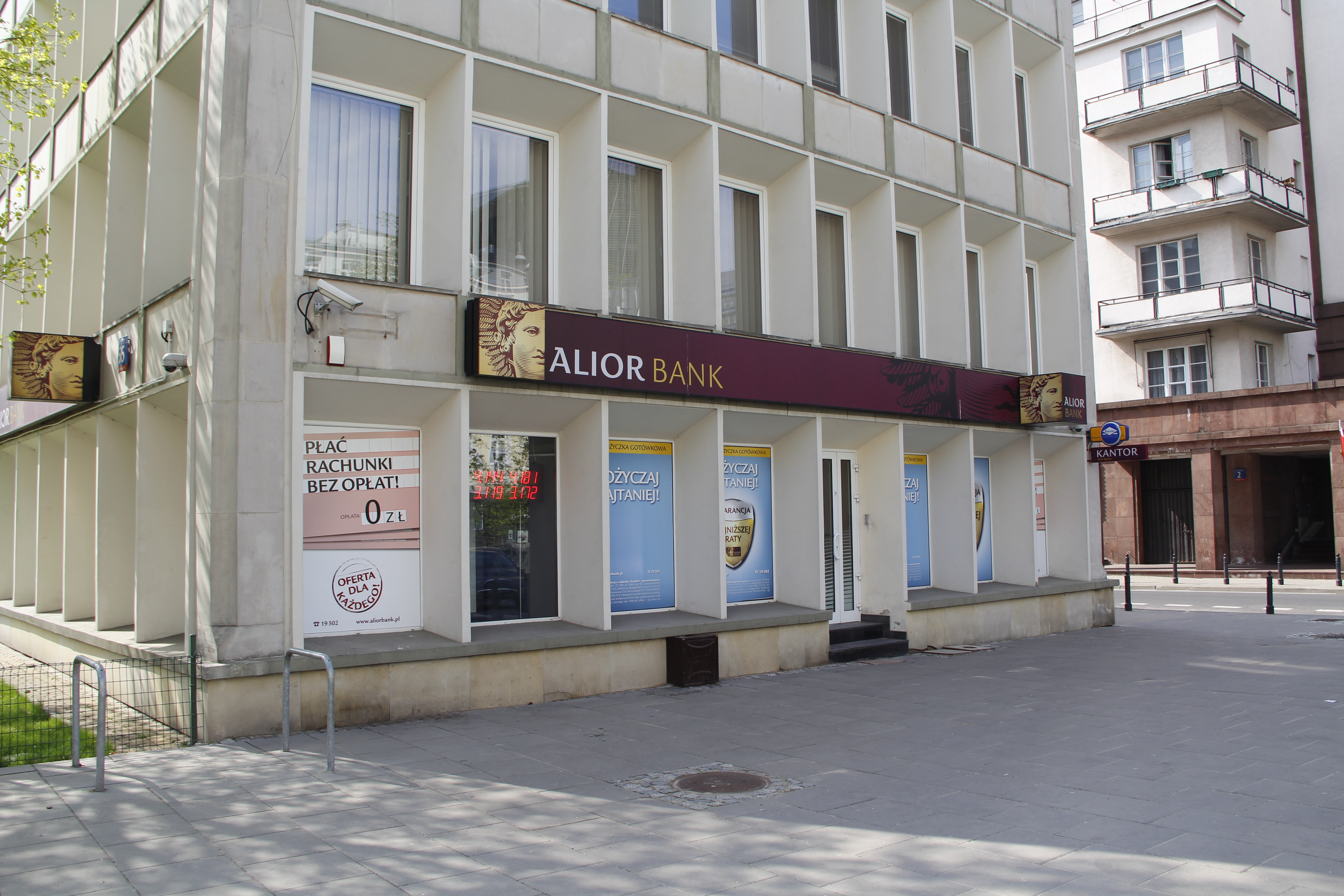 poznanska street warsaw, alior bank